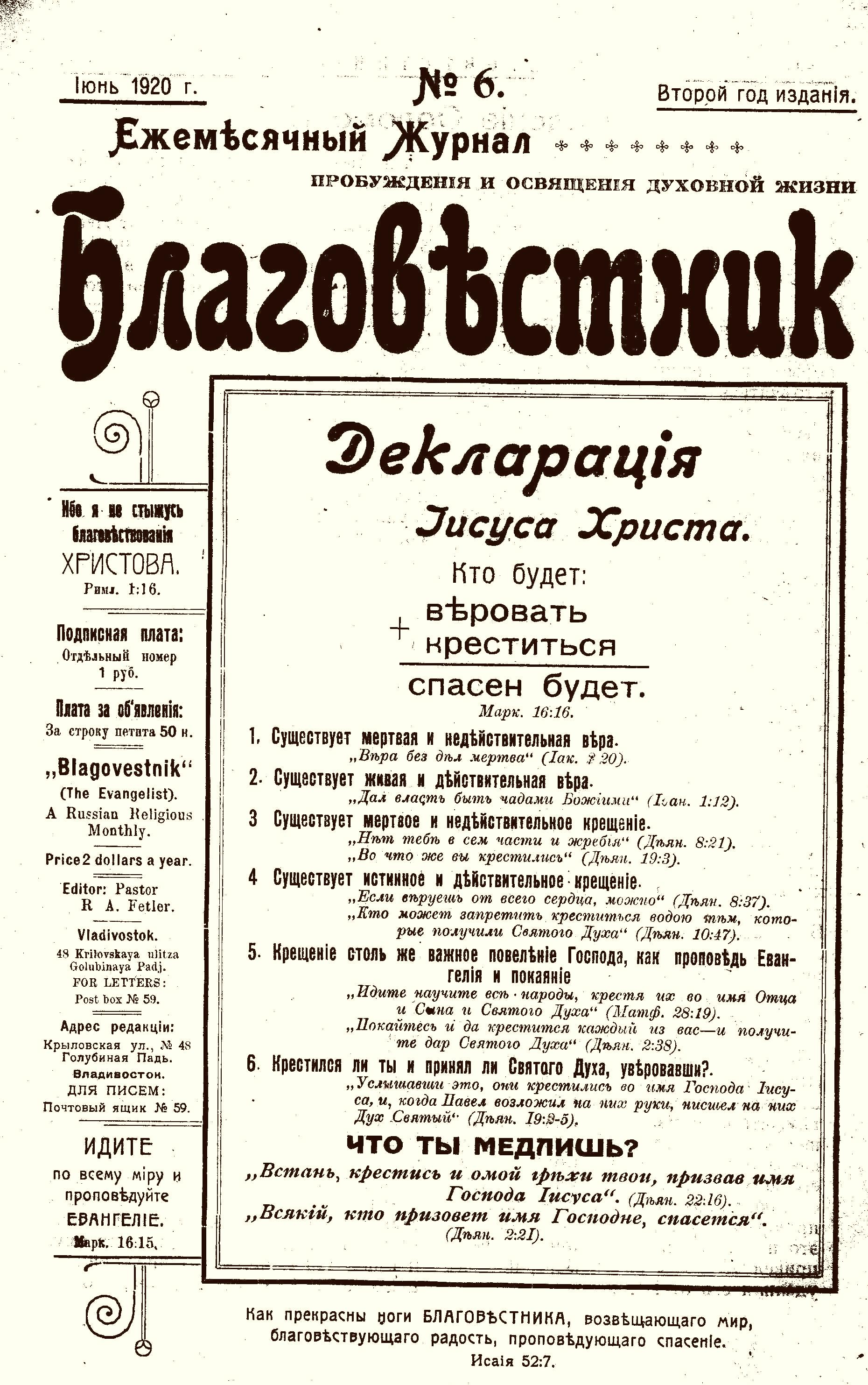 Обложка одного из номеров издававшегося во Владивостоке евангельского журнала "Благовестник". Редактор - пресвитер Владивостокской общины баптистов Роберт Фетлер.